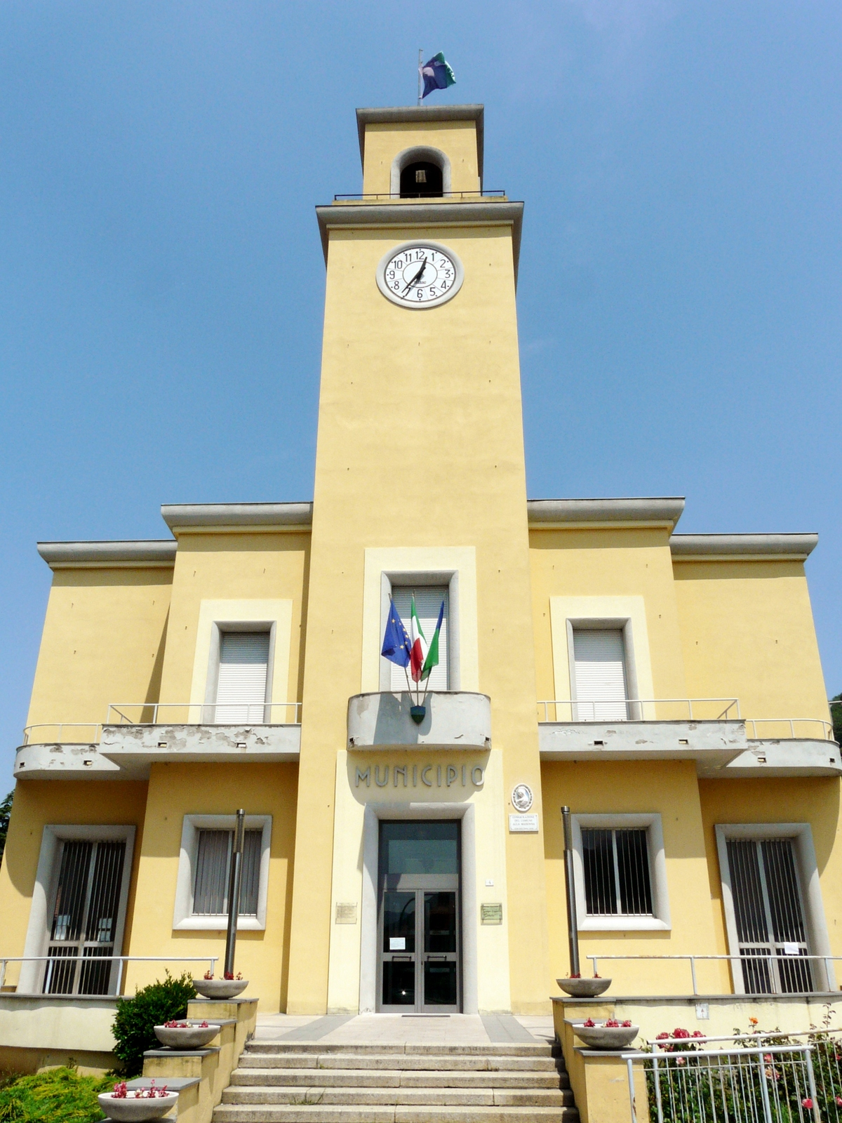 Palazzo municipale, Campo Ligure, Liguria, Italia